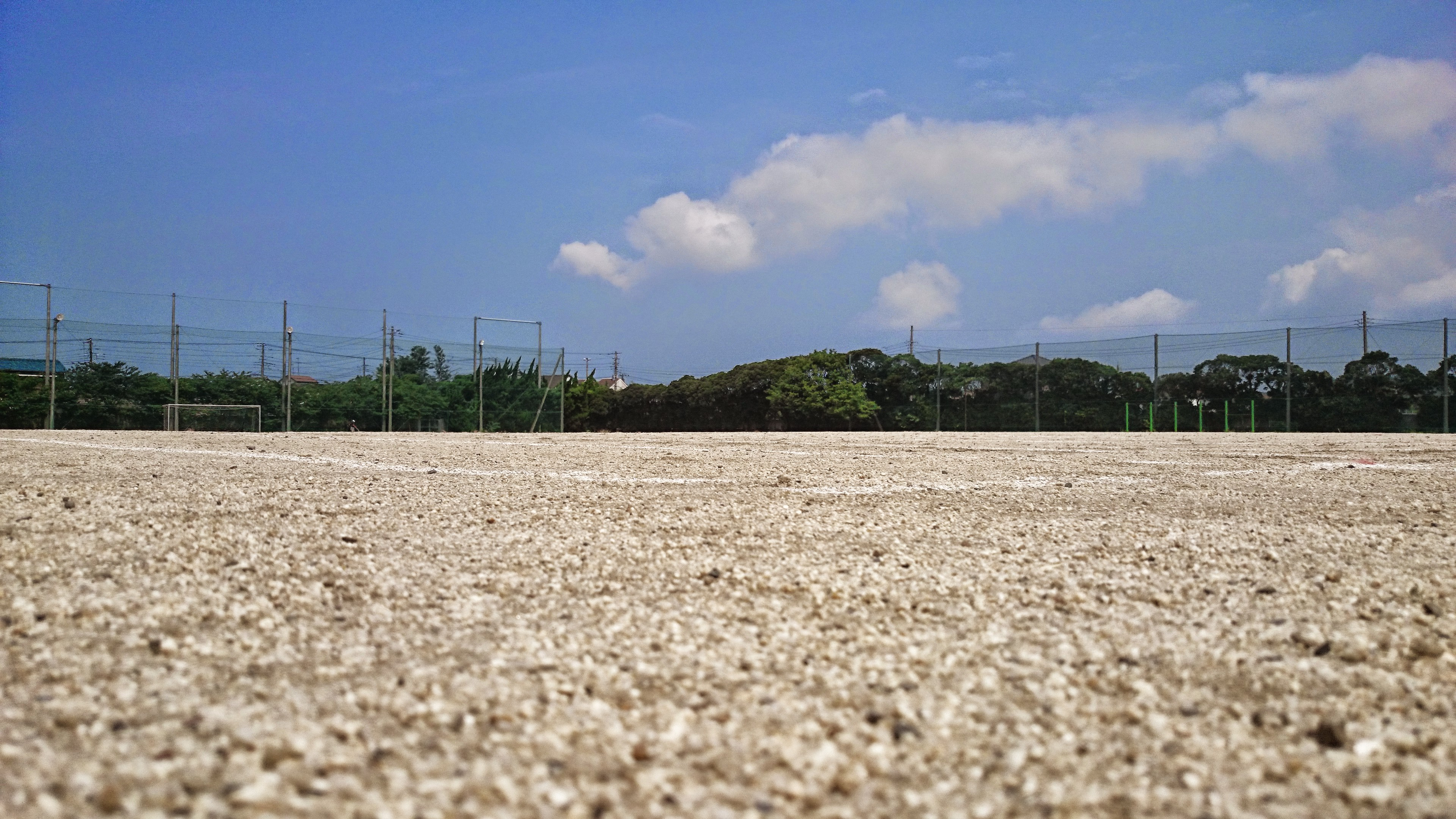 君津商業高校 グラウンド